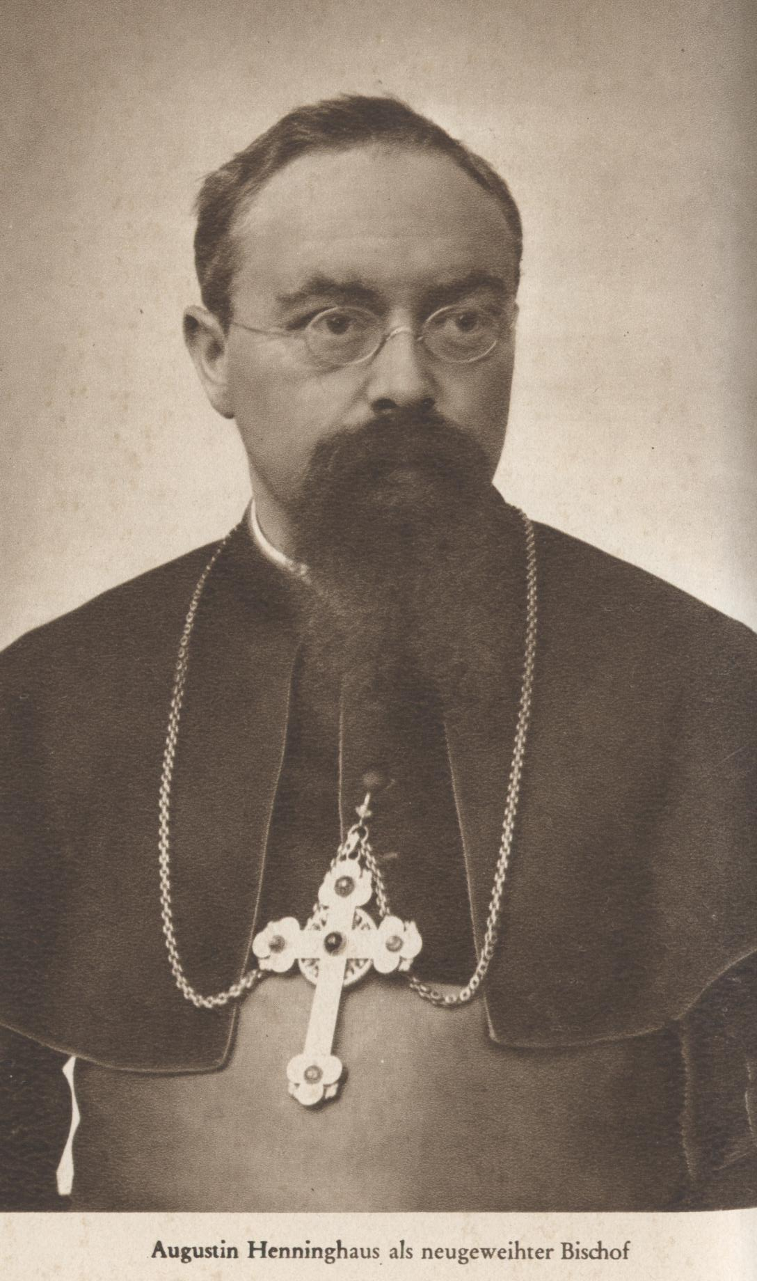 Bischof Augustin Hennighaus SVD, China